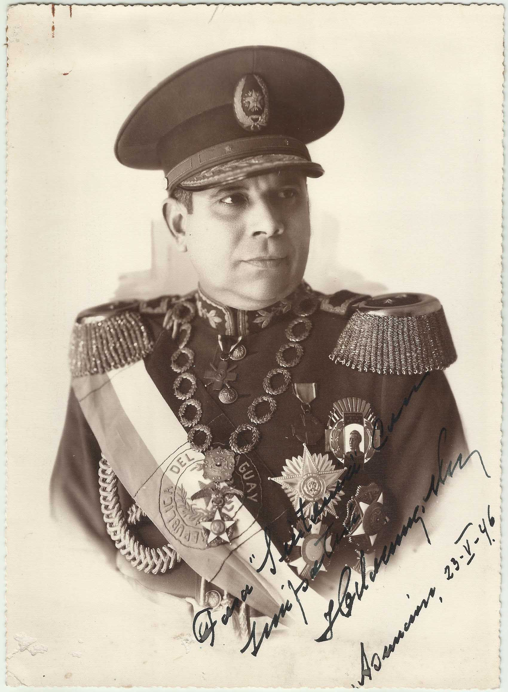 Higinio Morínigo Martínez, Presidente de la Republica del Paraguay (1940-1948)